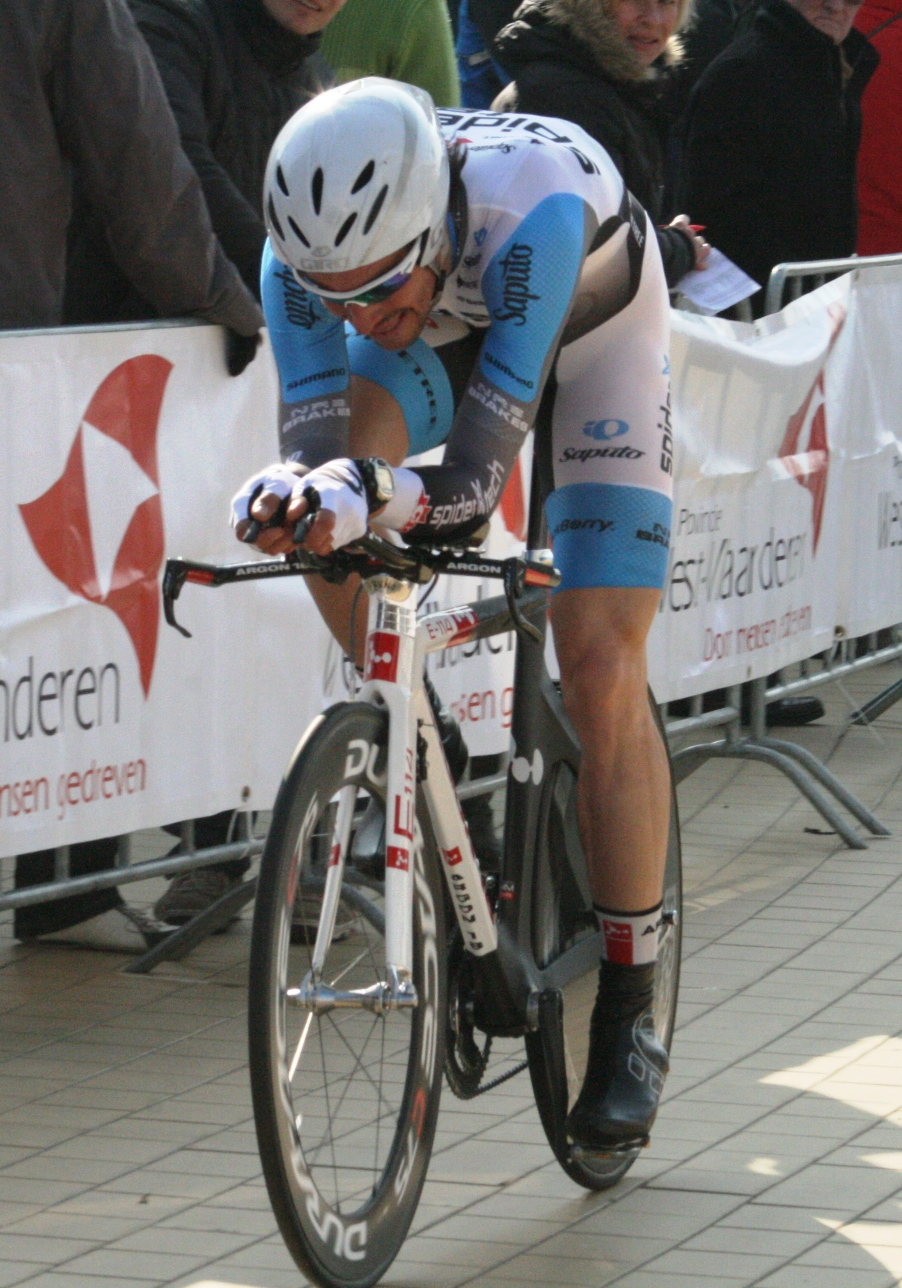 Driedaagse van West-Vlaanderen 2011, proloog in Middelkerke